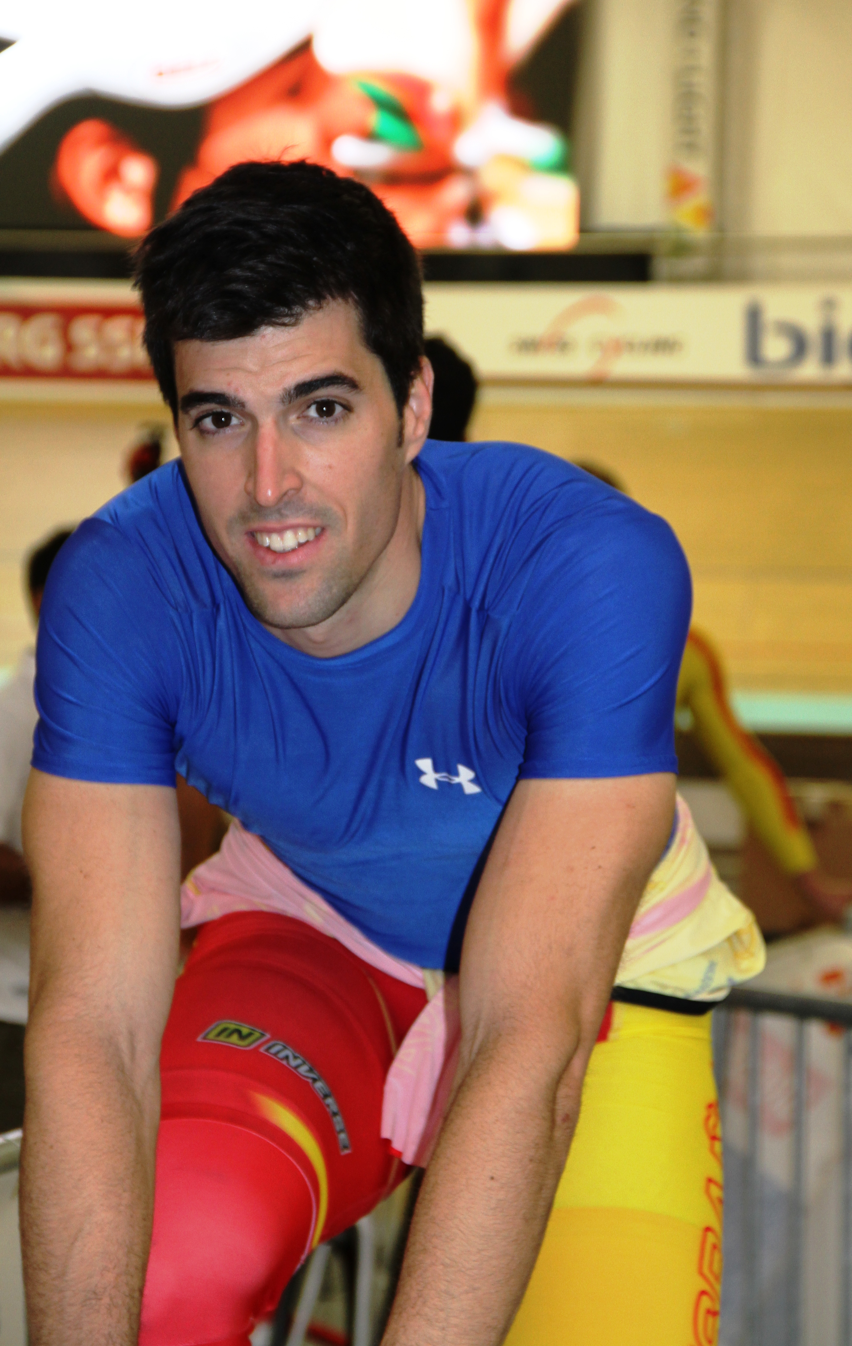 Juan Peralta Gascon, spanischer Radsportler The making of this document was supported by the Community-Budget of Wikimedia Germany.